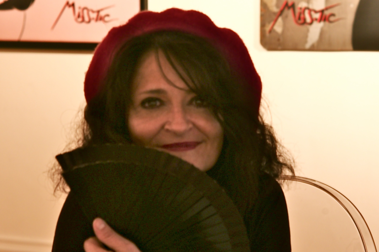 L'artiste Miss.Tic à la galerie Lelia Mordoch à Paris, lors d'un tournage d'un portrait d'elle par la réalisatrice Agnès Varda.